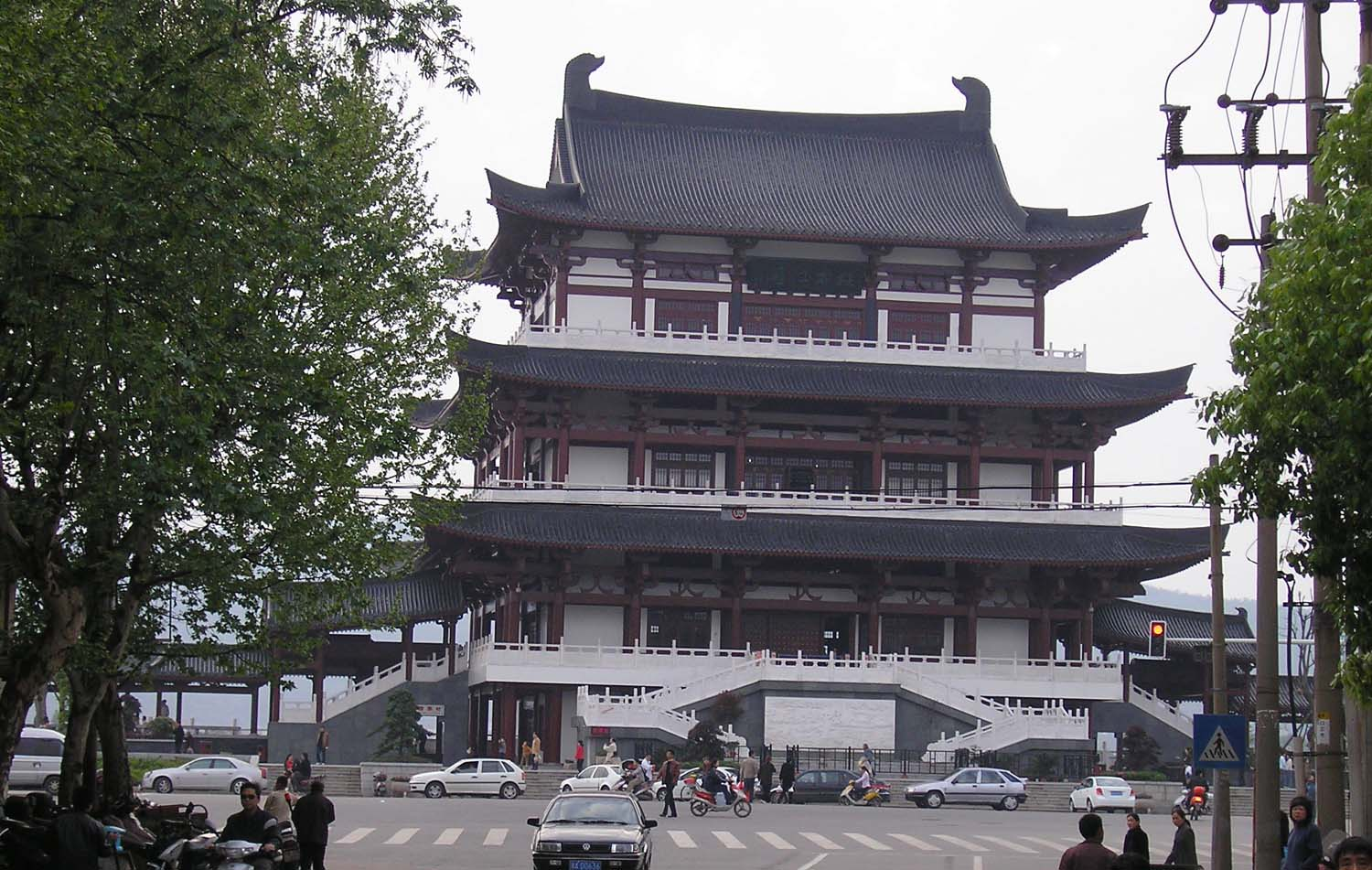 湖南長沙河東城區西湖橋的杜甫江閣，2006年4月15日Cncs拍攝。